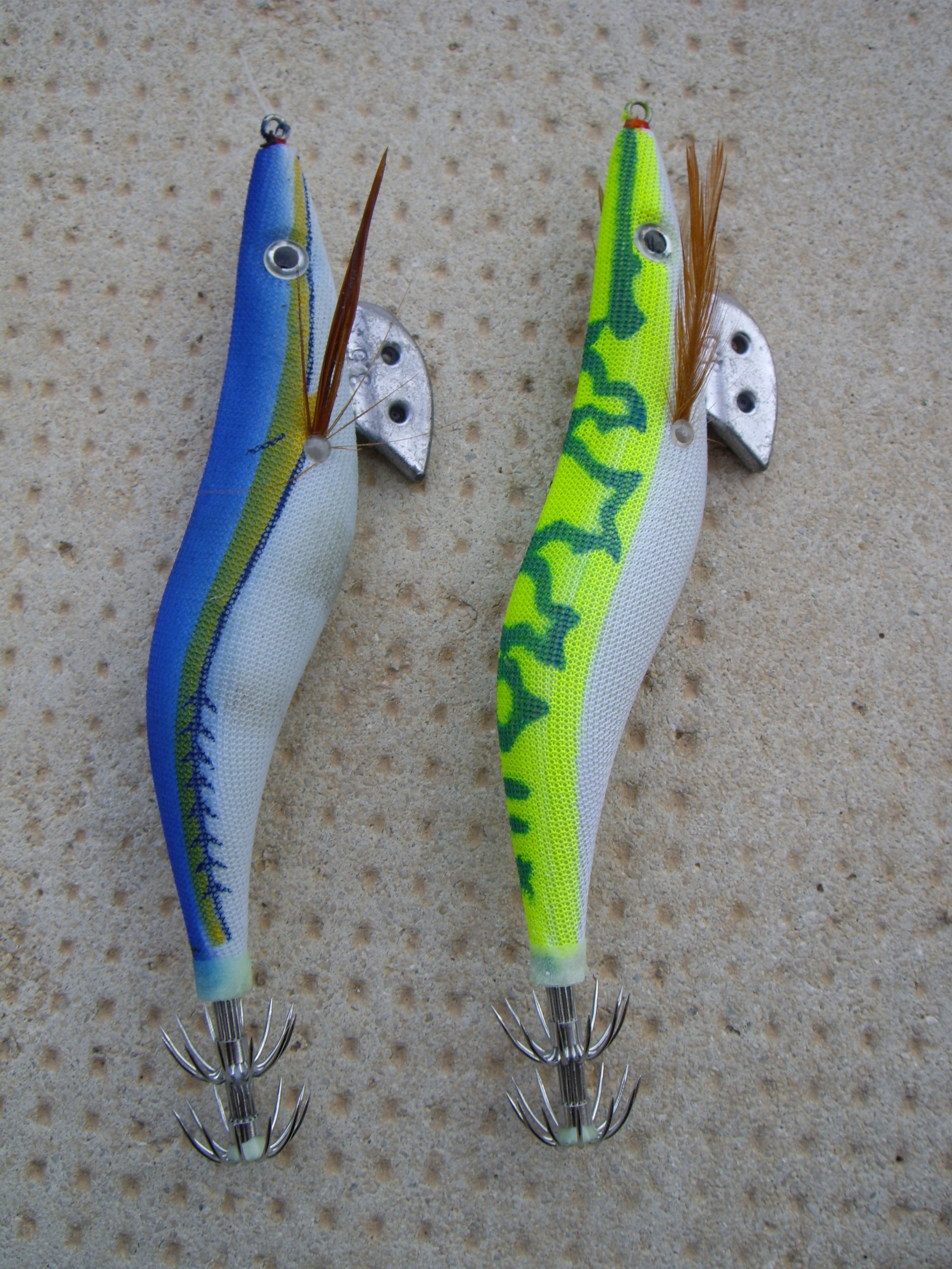 Turluttes semi-plombées à double couronne, en forme de crevette. Longueur : 13 cm. Pour la pêche aux céphalopodes (seiche, calamar).